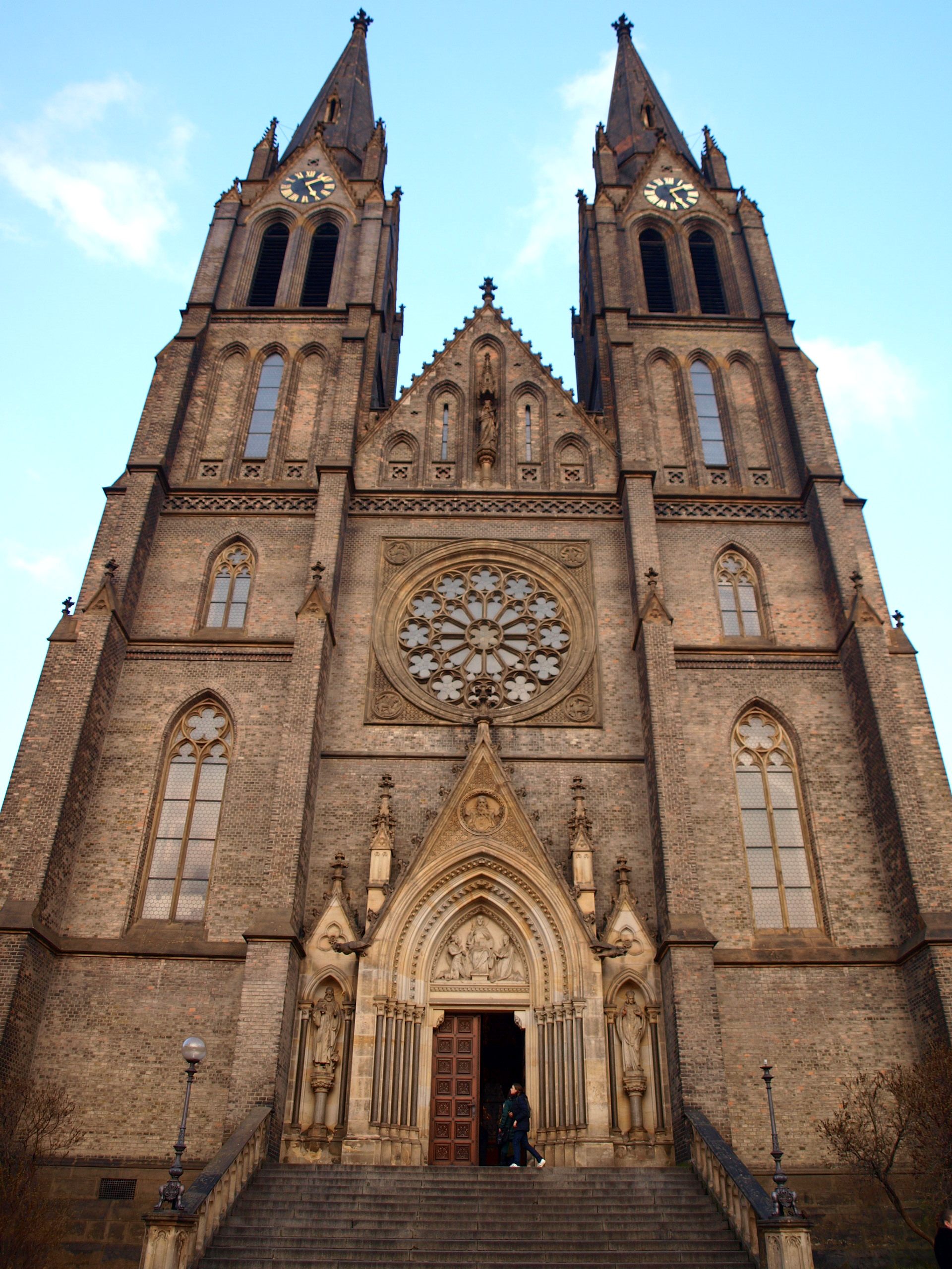 Kostel sv. Ludmily